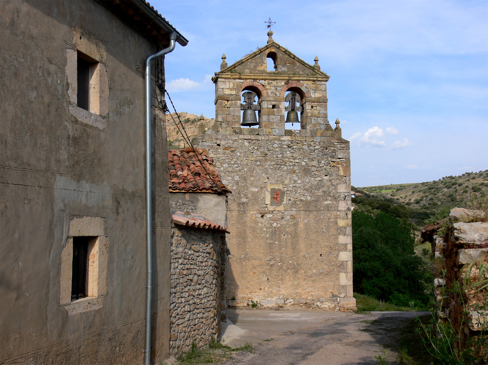 Hoz de Arriba, aldea de Montejo de Tiermes en la provincia de Soria (España).